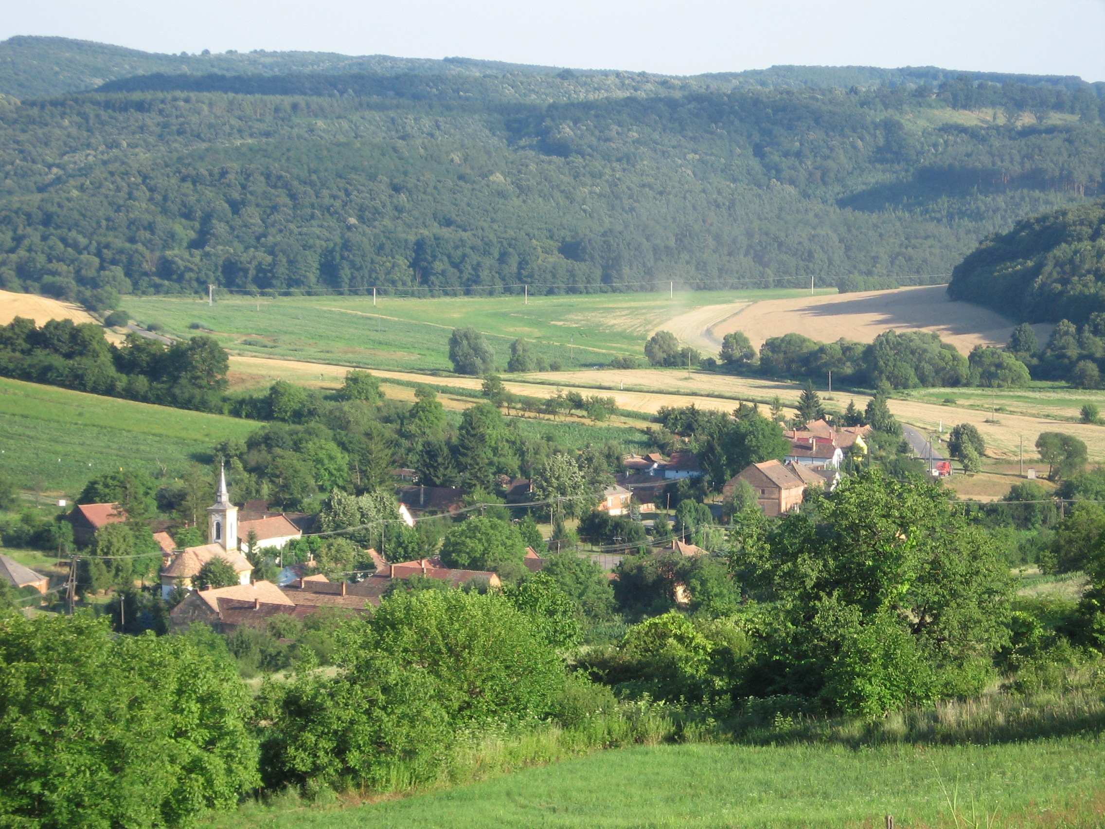 A falu látképe a temető feletti földesútról